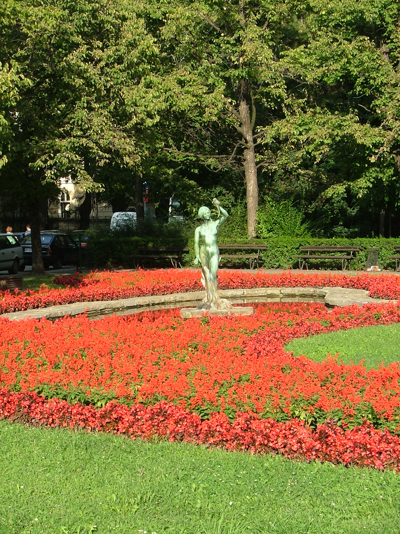 Српски (ћирилица): СПО86